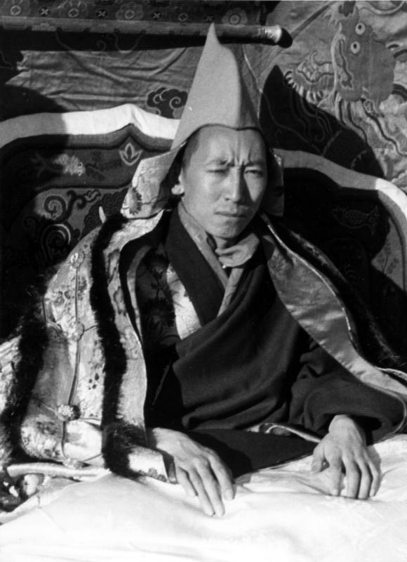 Lhasa, Regent